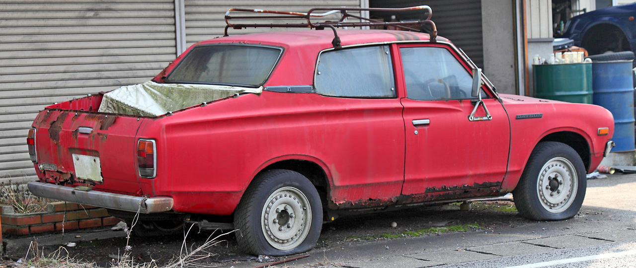 Datsun Pickup 1500 (U620)